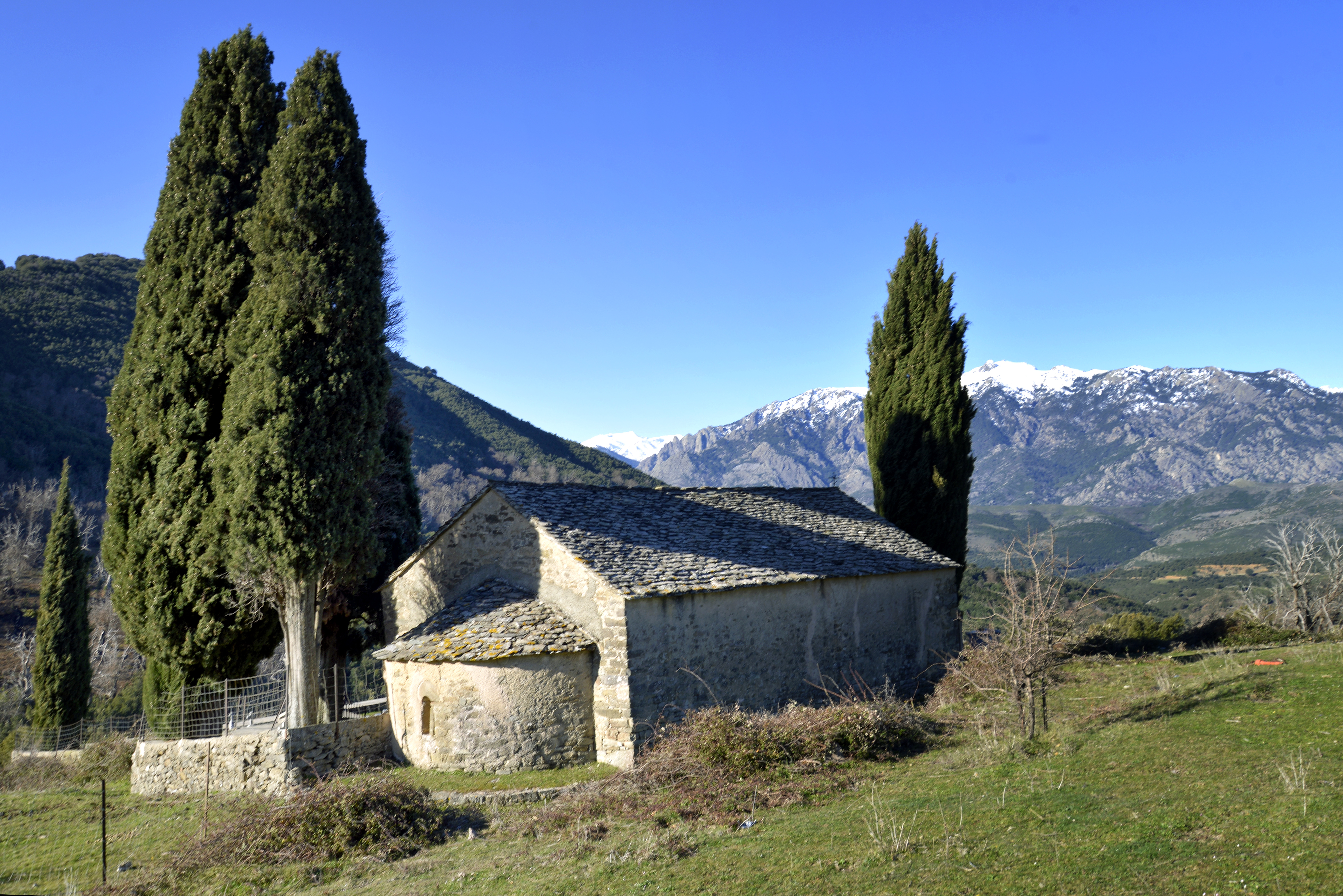 Tralonca, Talcini (Haute-Corse) - L'ancienne église paroissiale, chapelle Saint-Laurent (San Lorenzo), attenante au cimetière. Elle pourrait être une des plus anciennes églises romanes de Corse (construction réalisée entre le VIIe et le IXe siècle ?). Sous la chapelle, se trouve une arca (fosse commune).